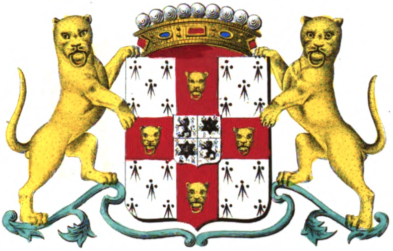 Armoiries de la famille Clément de Cléty